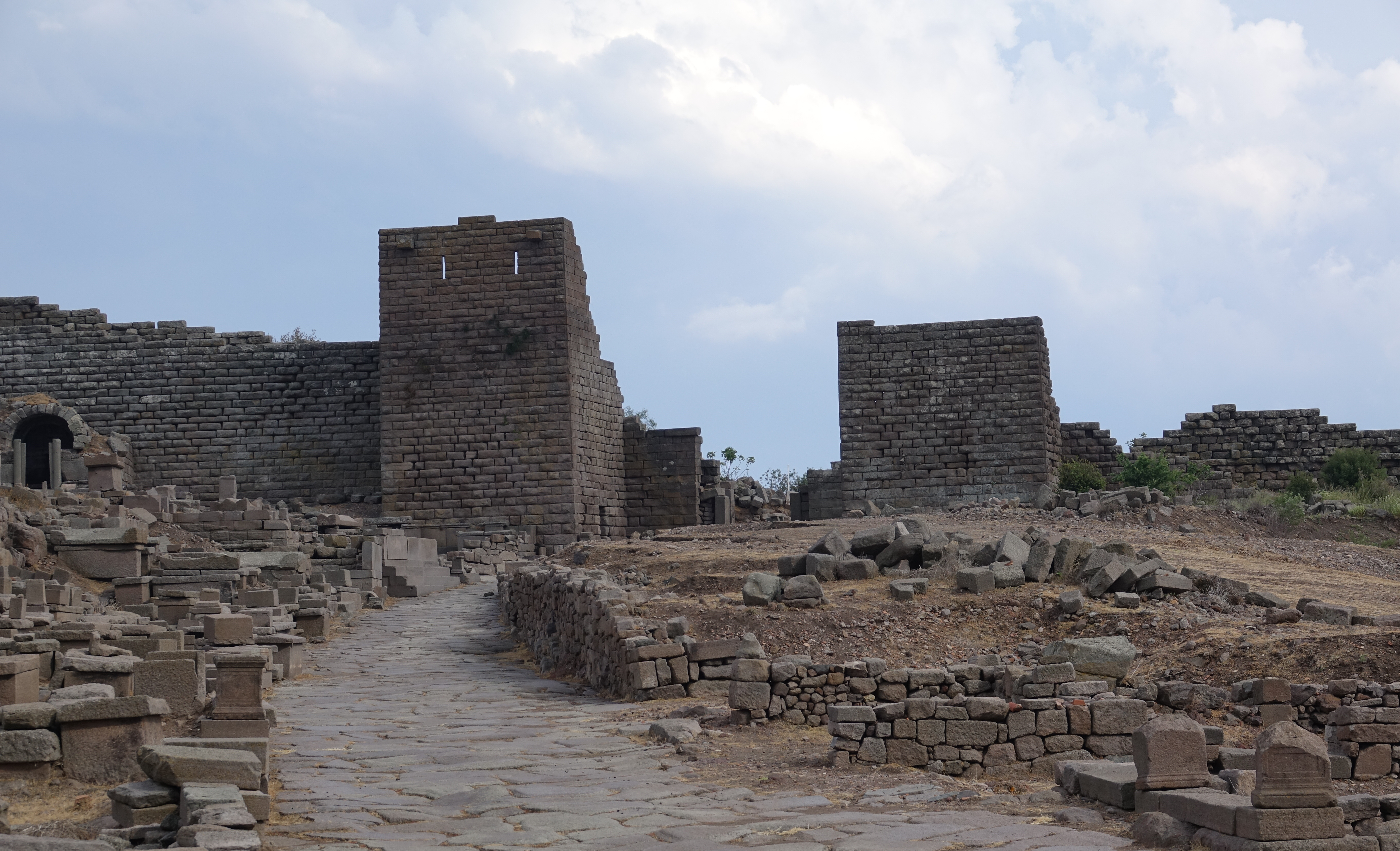 Die hellenistische Stadtmauer umschloss die unterhalb der Akropolis gelegene Stadt. Vor der Stadtmauer befand sich die Nekropole.